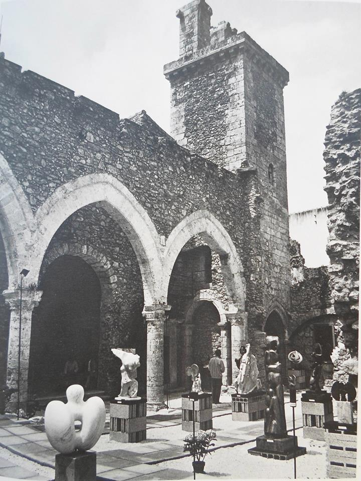 Mostra di Scultura Contemporanea Giacomo Serpotta - Ex-Chiesa dell'Annunziata, Alcamo (1986). Organizzata dall'associazione artistica Artecentro.